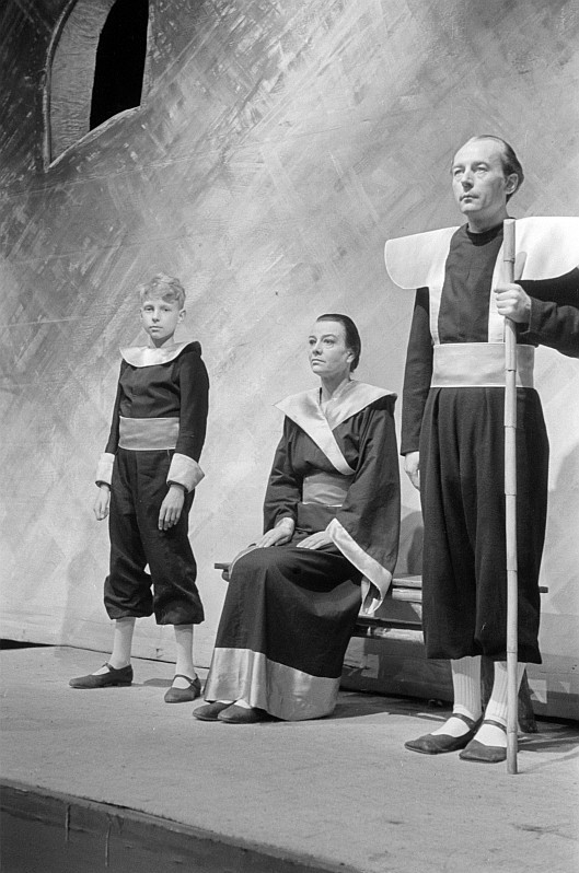 Original image description from the Deutsche Fotothek Szenenbilder